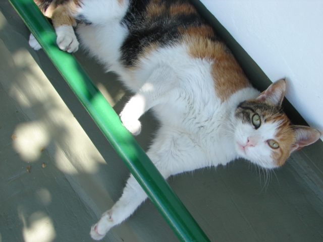 Gata doméstica